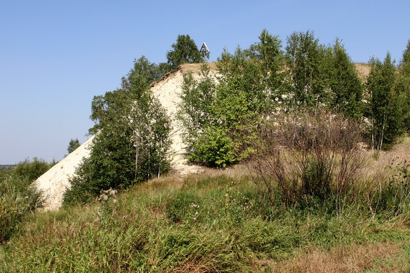 Охонины Брови, Катайский район This image is related to the protected area of Russia number 4510037